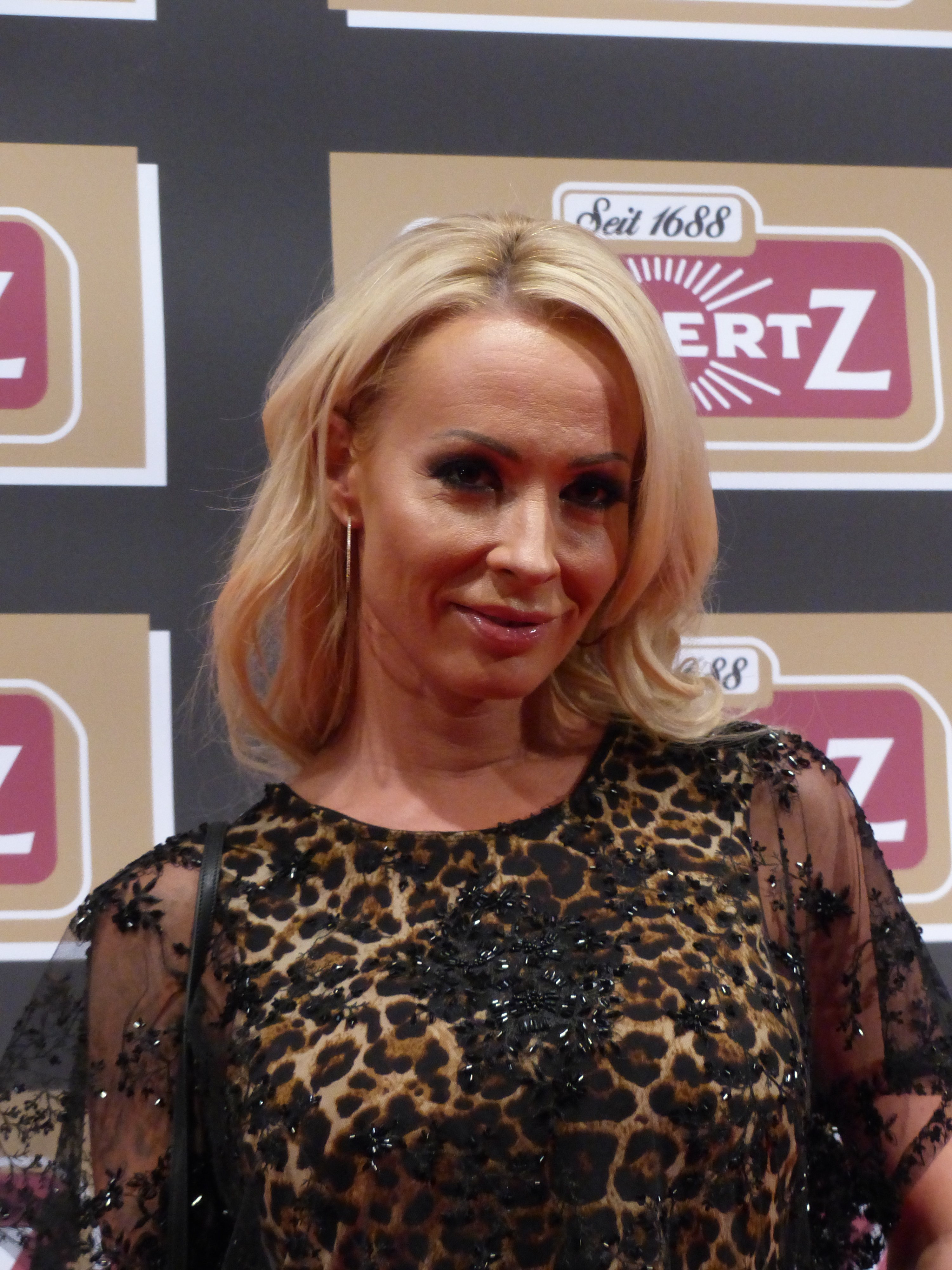 Cora Schumacher bei der Lambertz Monday Night, im Februar 2016.